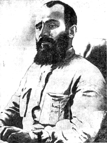 Атарбеков (настоящая фамилия Атарбекян) Георгий Александрович [2(14). 12.1892, Эчмиадзин, — 22.3.1925]